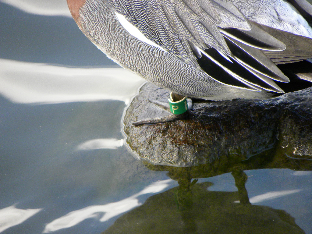 兵庫県伊丹市昆陽池で撮影